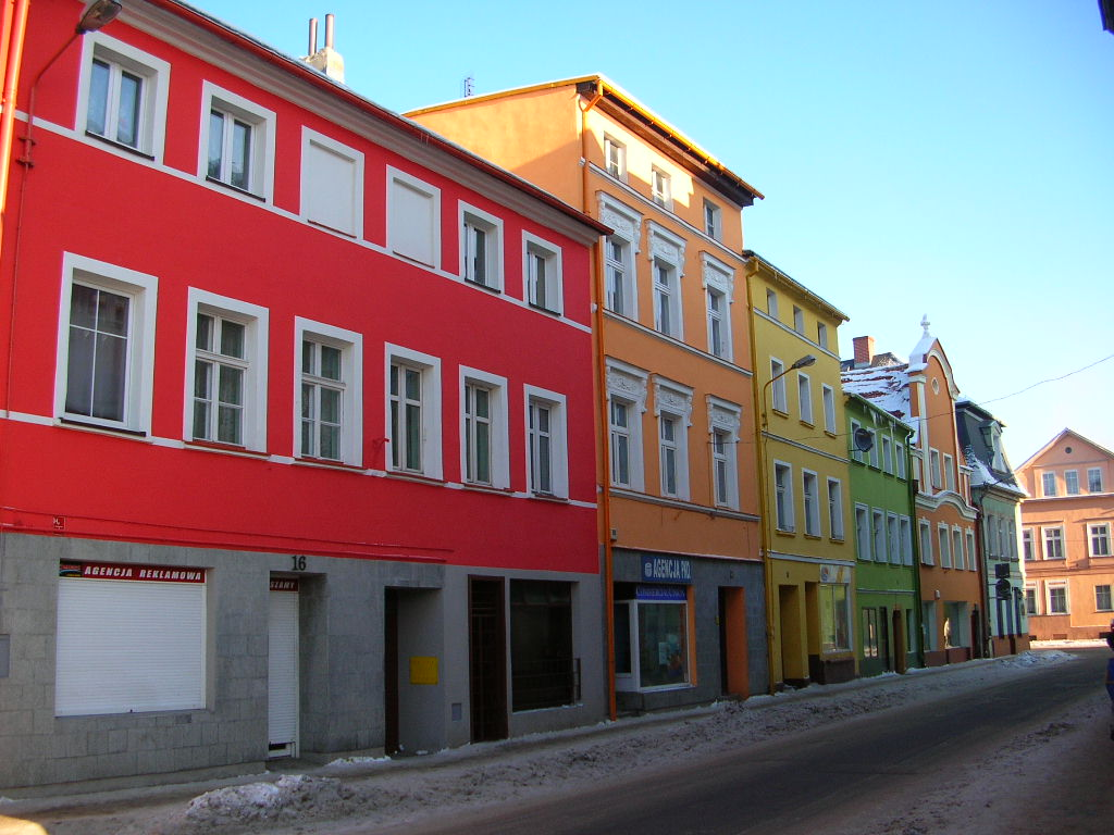 Kamienna Góra - Kamieniczki przy ul. W. Broniewskiego Autor - Bartek Wawraszko